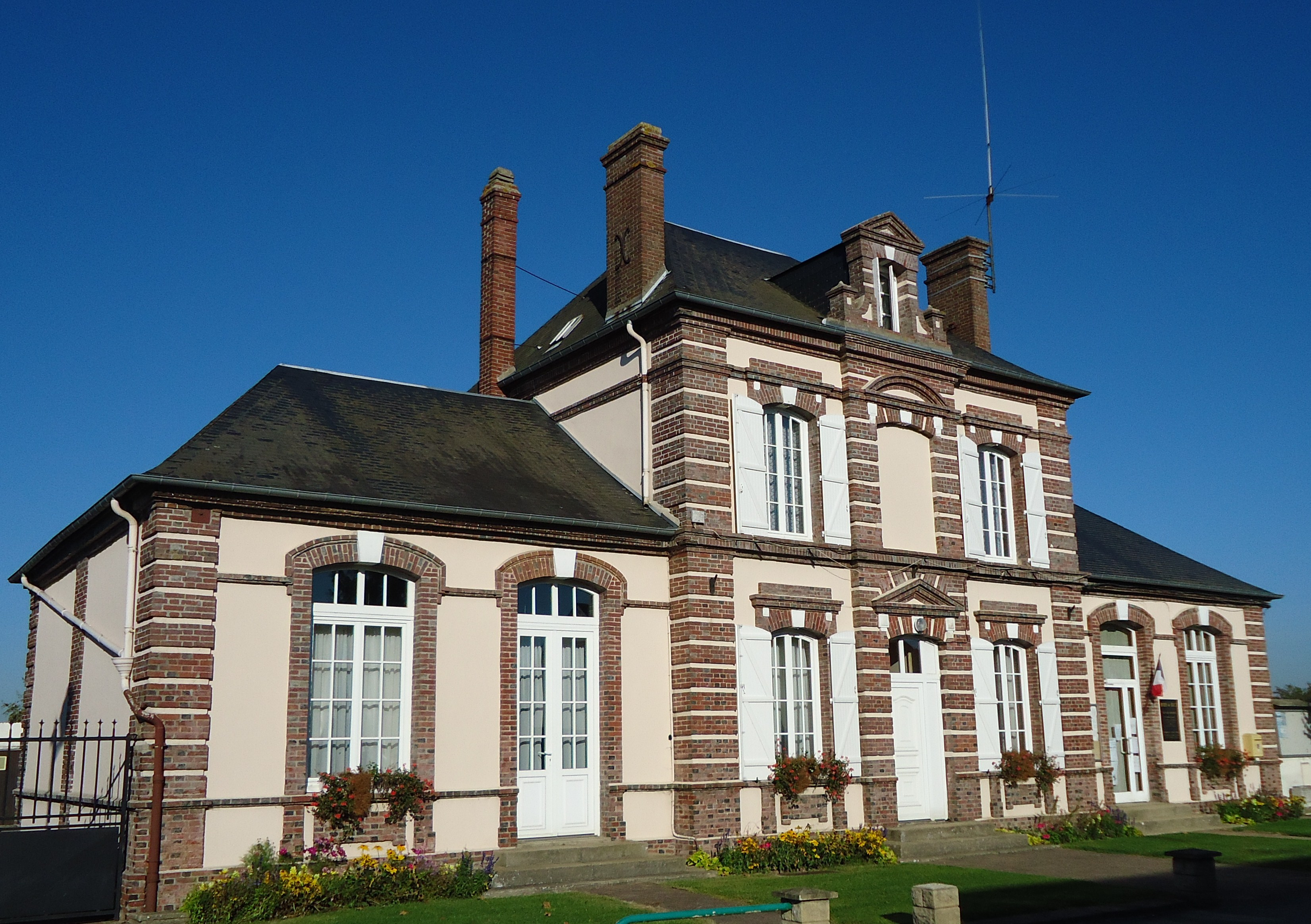 Mairie de Huest - Rue de Vernon